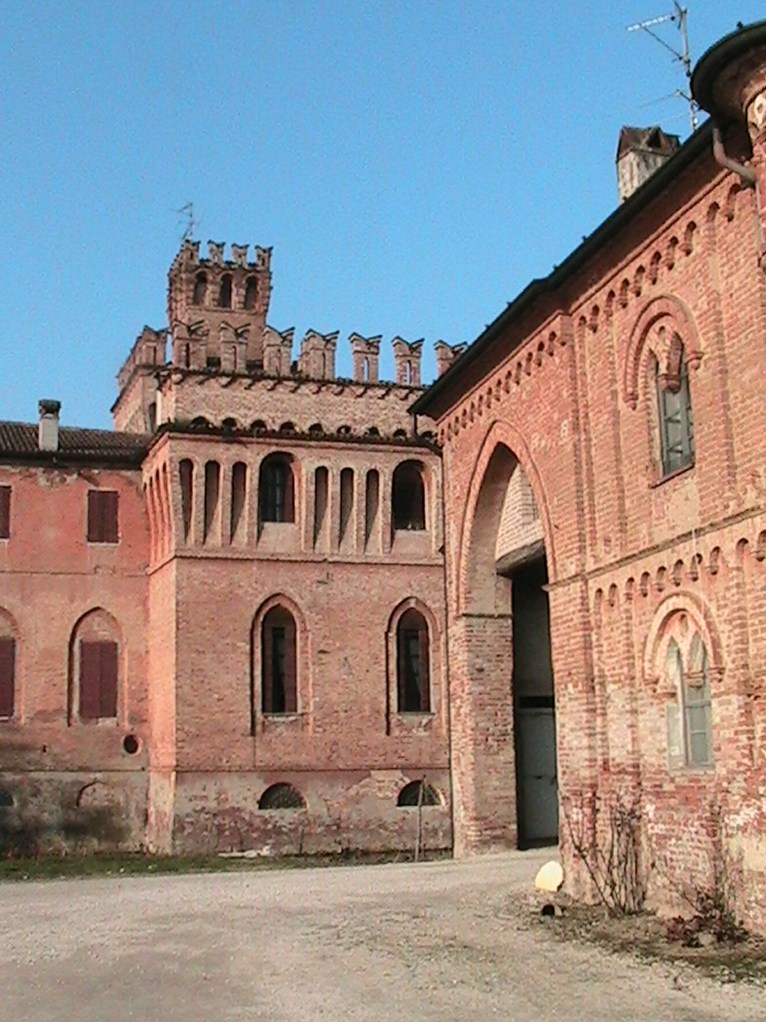 Cicognolo - Il Castello